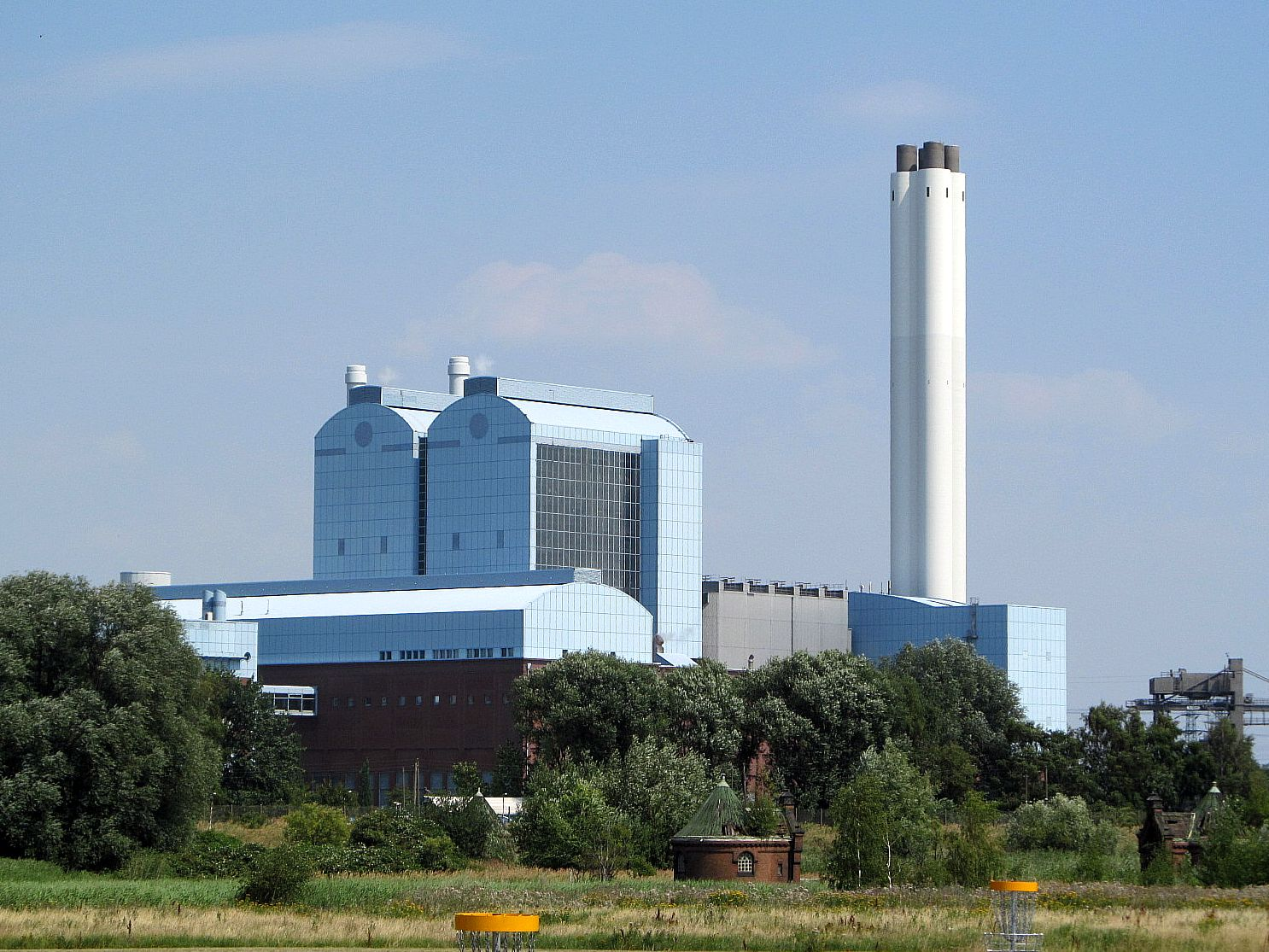 Heizkraftwerk Tiefstack, Ansicht von der Wasserkunst Kaltehofe